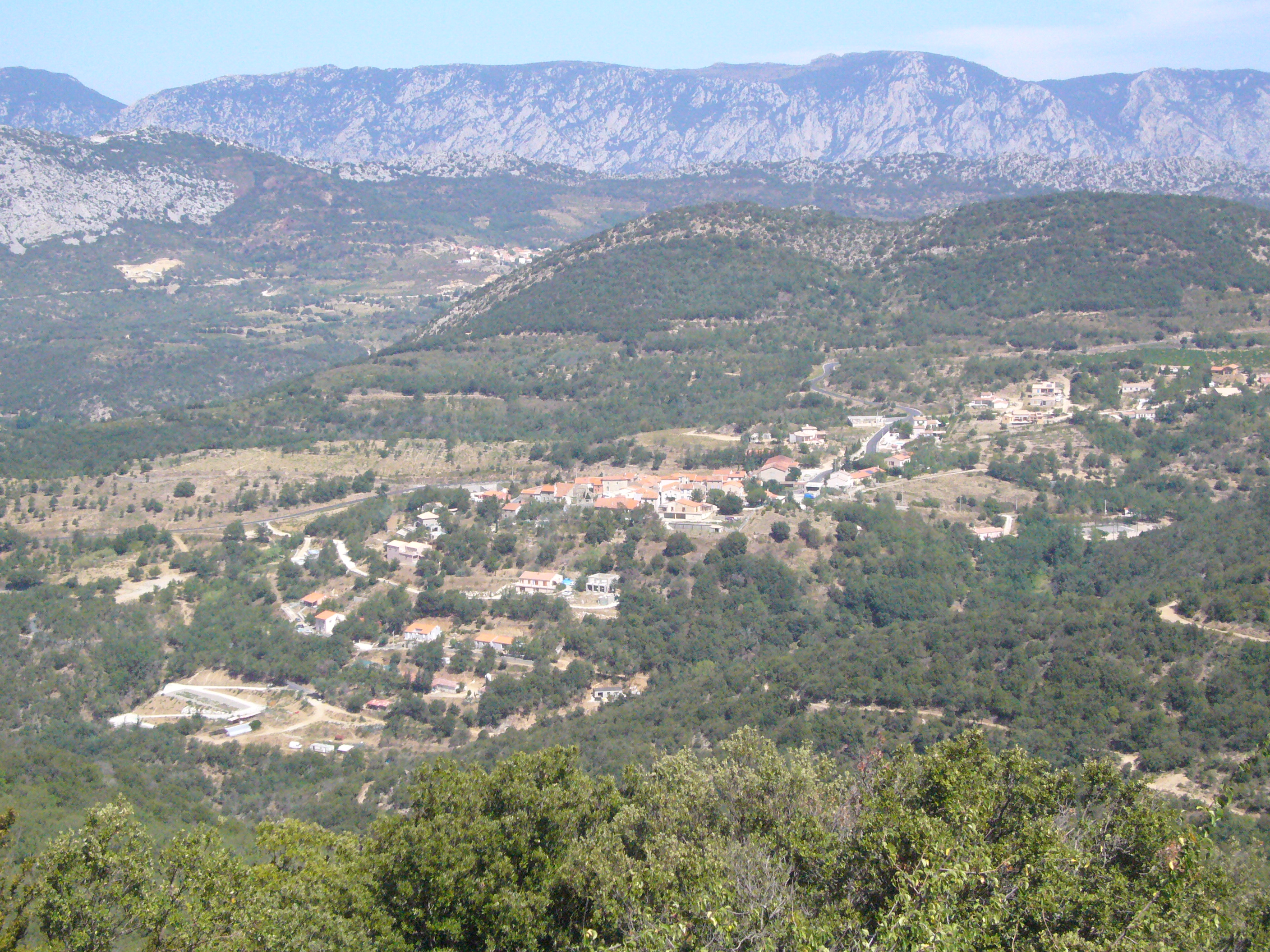 Vue du village de Saint-Arnac (Pyrénées-Orientales, France)